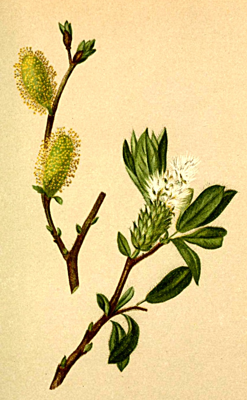 Salix helvetica